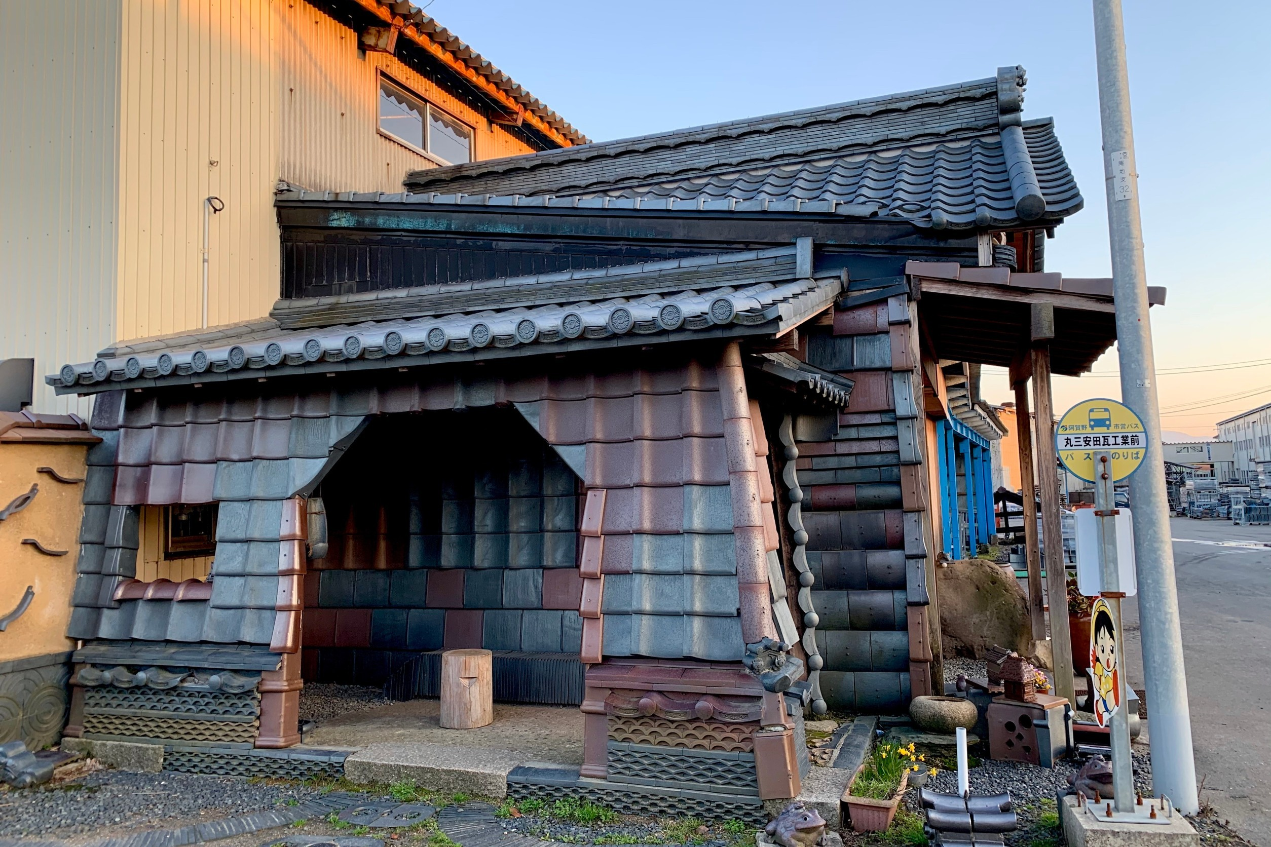 やすだ瓦ロードにある阿賀野市営バスの停留所と待合室（新潟県阿賀野市，2020年4月）